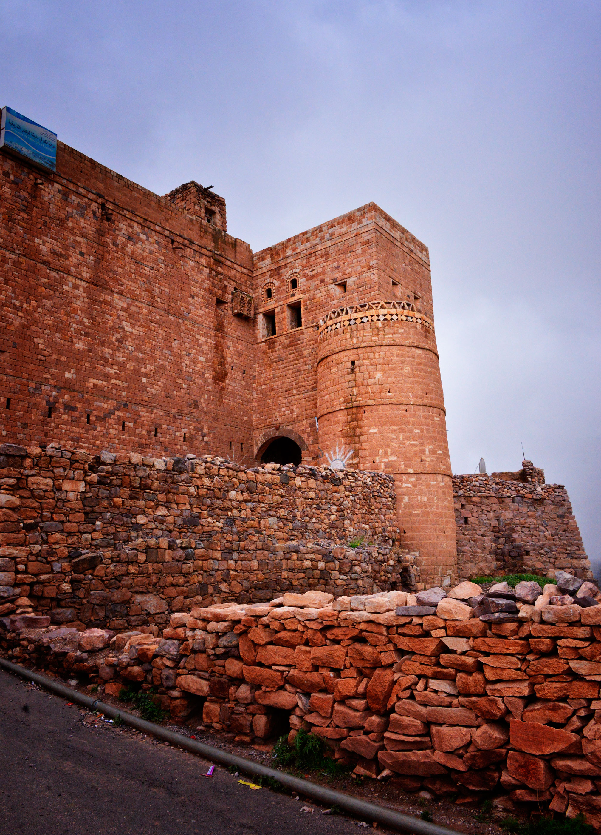 Yemen